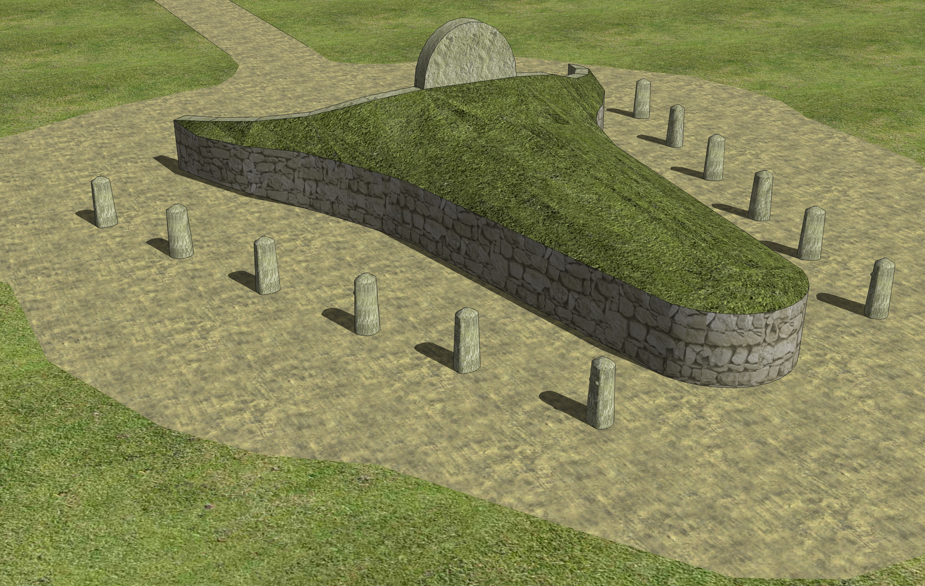 Modello 3D della tipologia di Tomba dei Giganti ad esedra con arco centinato.